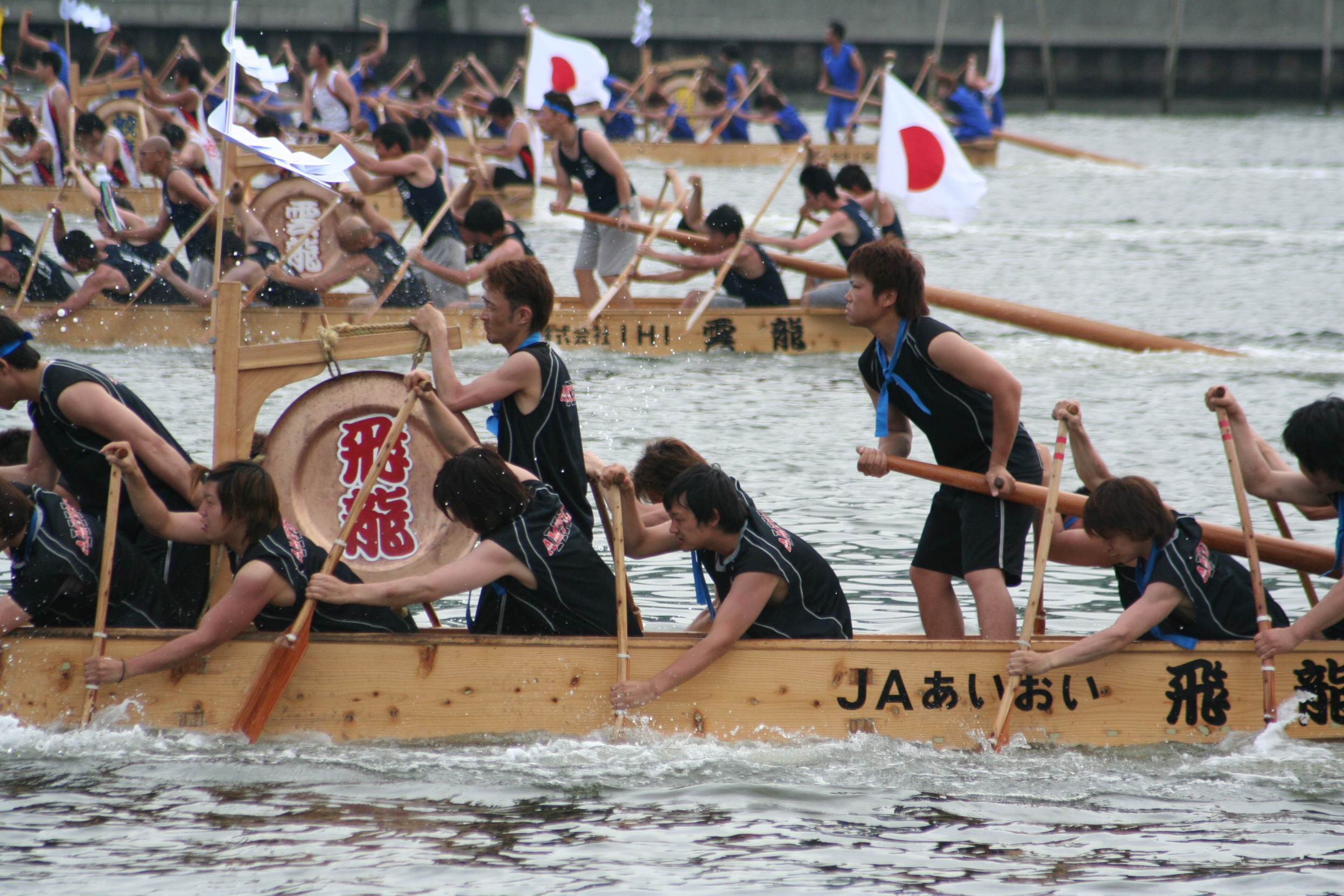 相生ペーロン祭。兵庫県相生市にて毎年開催される祭。2009年7月11･12日の2日間にかけて行なわれた祭の2日目の様子。